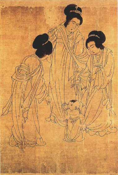 Во дворце (фрагмент)